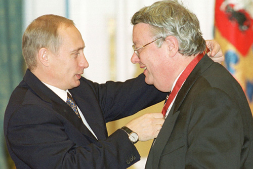 МОСКВА, КРЕМЛЬ. Церемония вручения государственных наград. Орден «За заслуги перед Отечеством» II степени вручен ректору МГТУ имени Баумана Игорю Федорову.